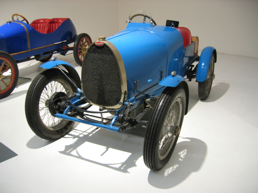 Bugatti Type 13 - Musée de l'automobile de Mulhouse